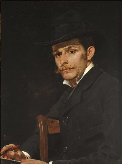 retrato del pintor pablo burchard